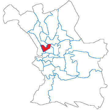 Situation du canton dans la ville de Marseille